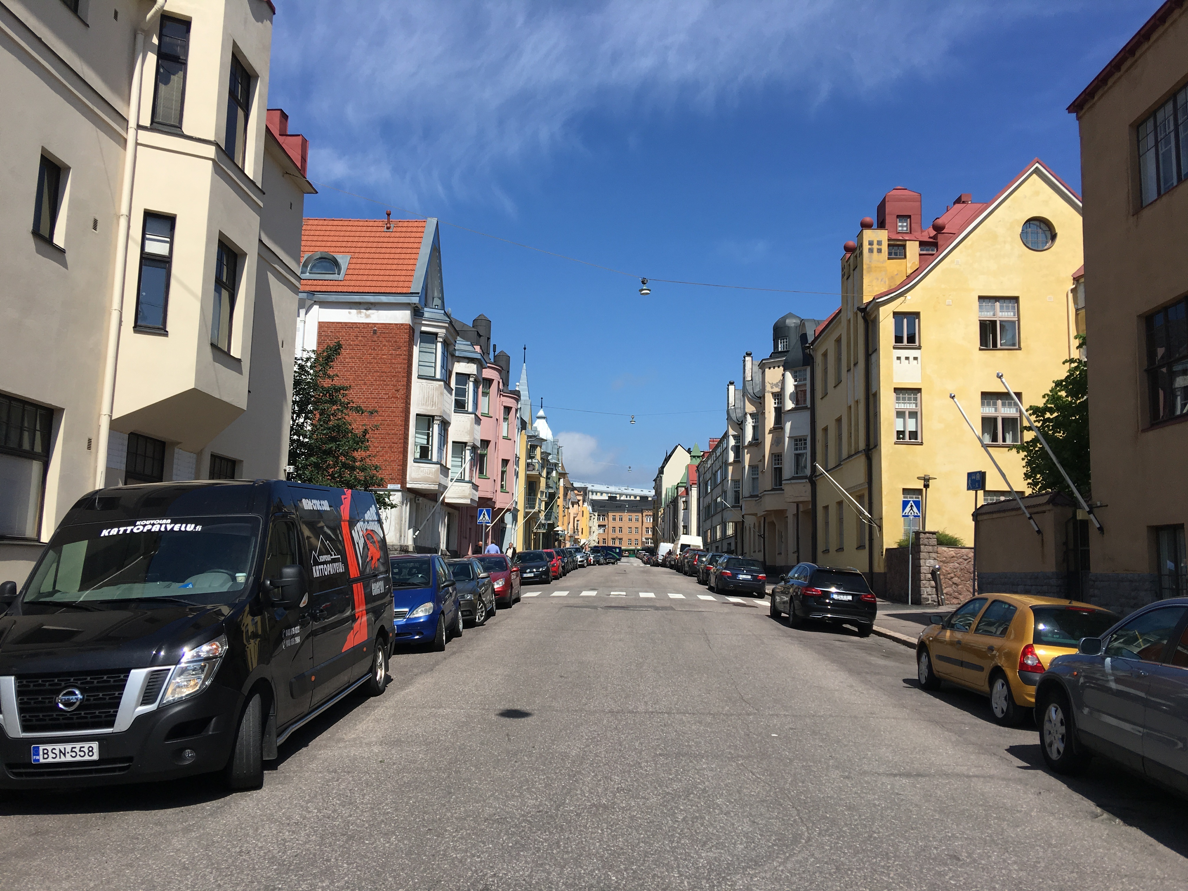 Huvilakatu Helsingin Ullanlinnassa kuvattuna Merikadulta päin.